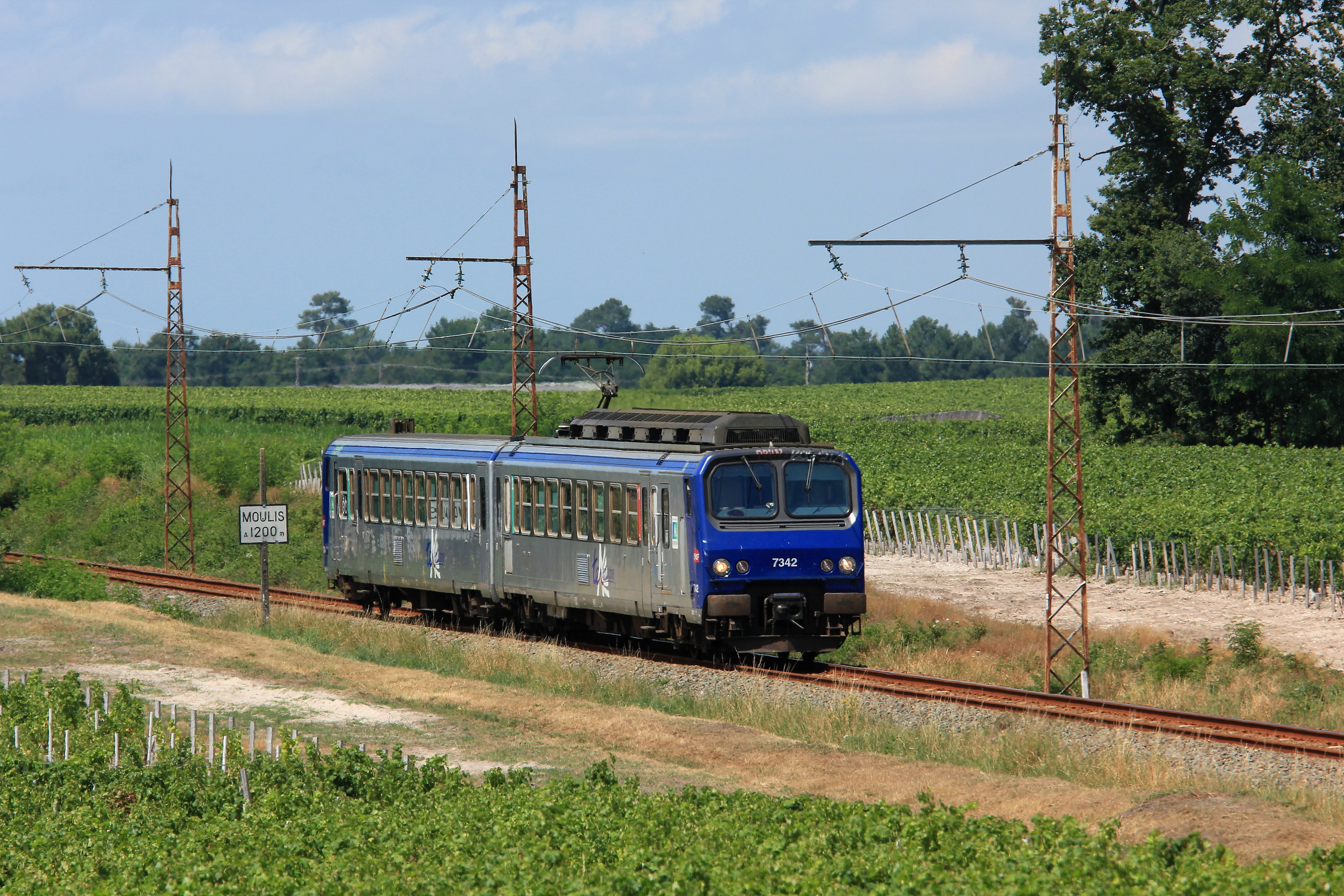 La Z 7372 peu après être repartie de Moulis - Listrac, dans le vignoble du Médoc.